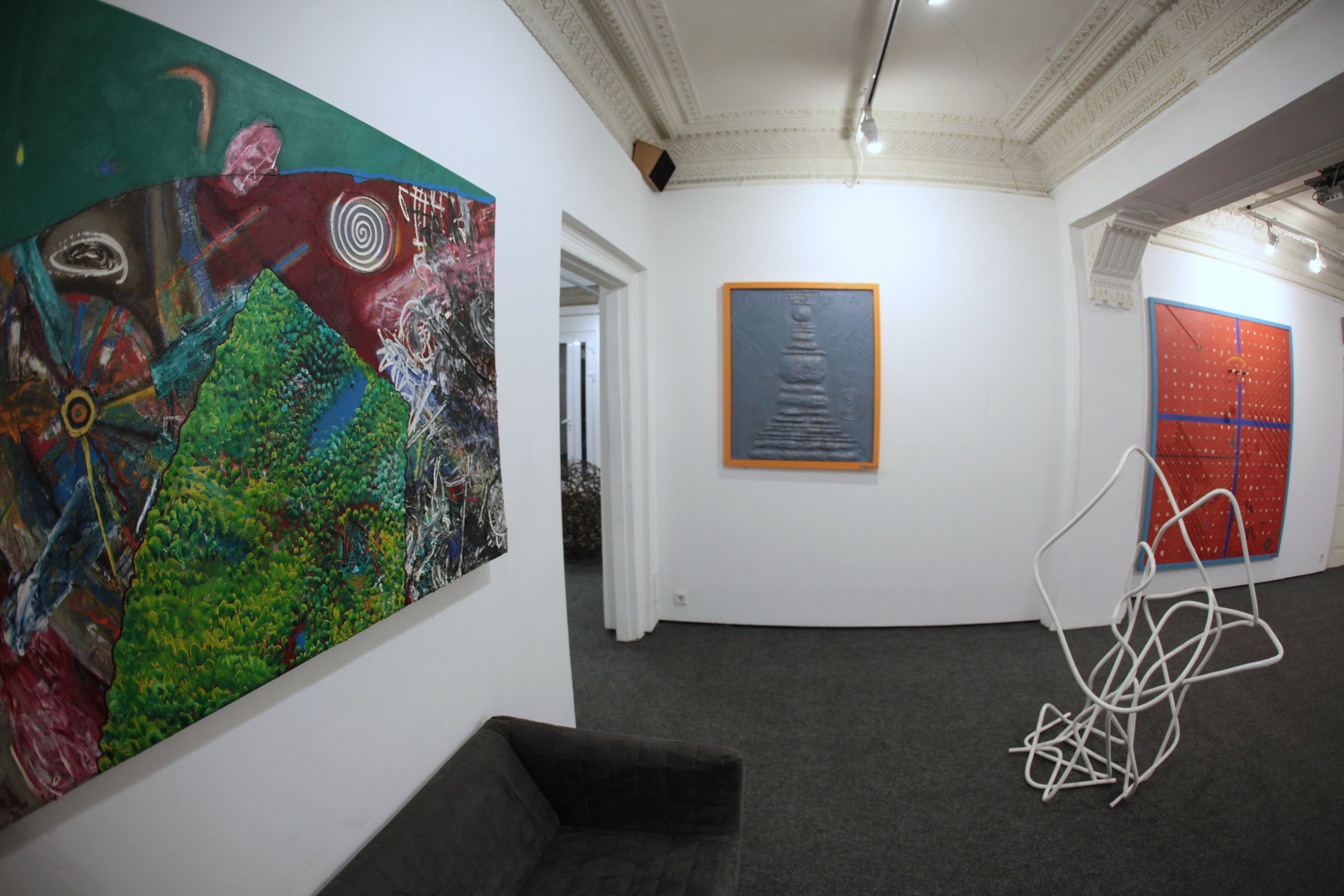 Експозиція виставки Володимира Бовкуна "За моїм вікном" в Карась Галереї, 2016